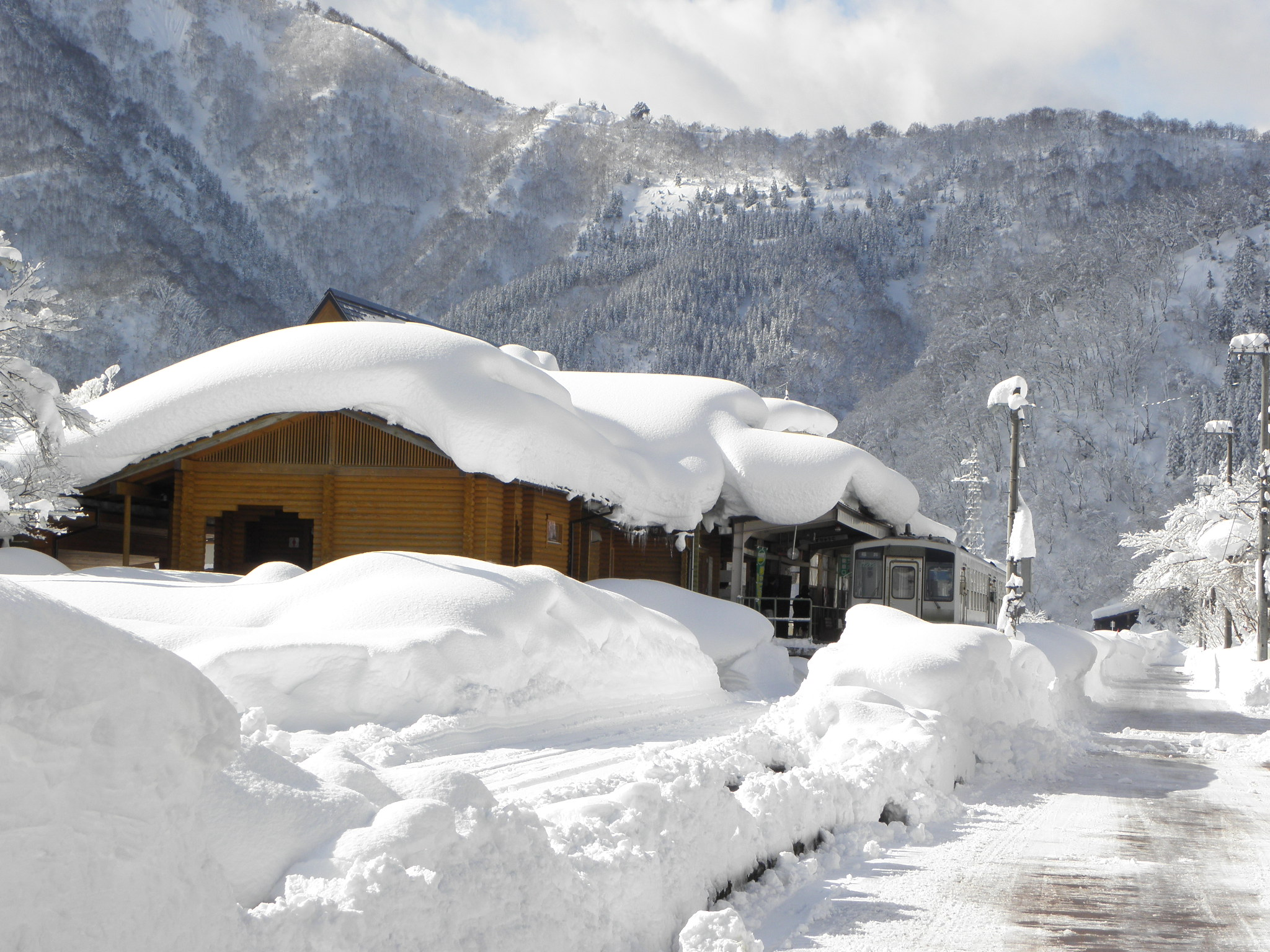 九頭竜湖駅(冬) 東側路上より